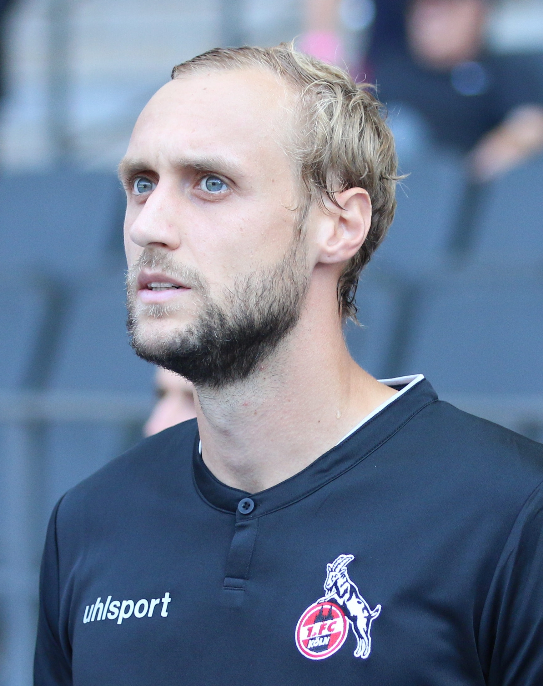 DFB-Pokal 2018/19, 1. Hauptrunde: BFC Dynamo gegen 1. FC Köln 1:9 (1:4): Marcel Risse